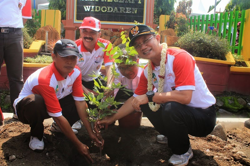 Roadshow Ngawi Ijo Royo-rroyo di Kauman